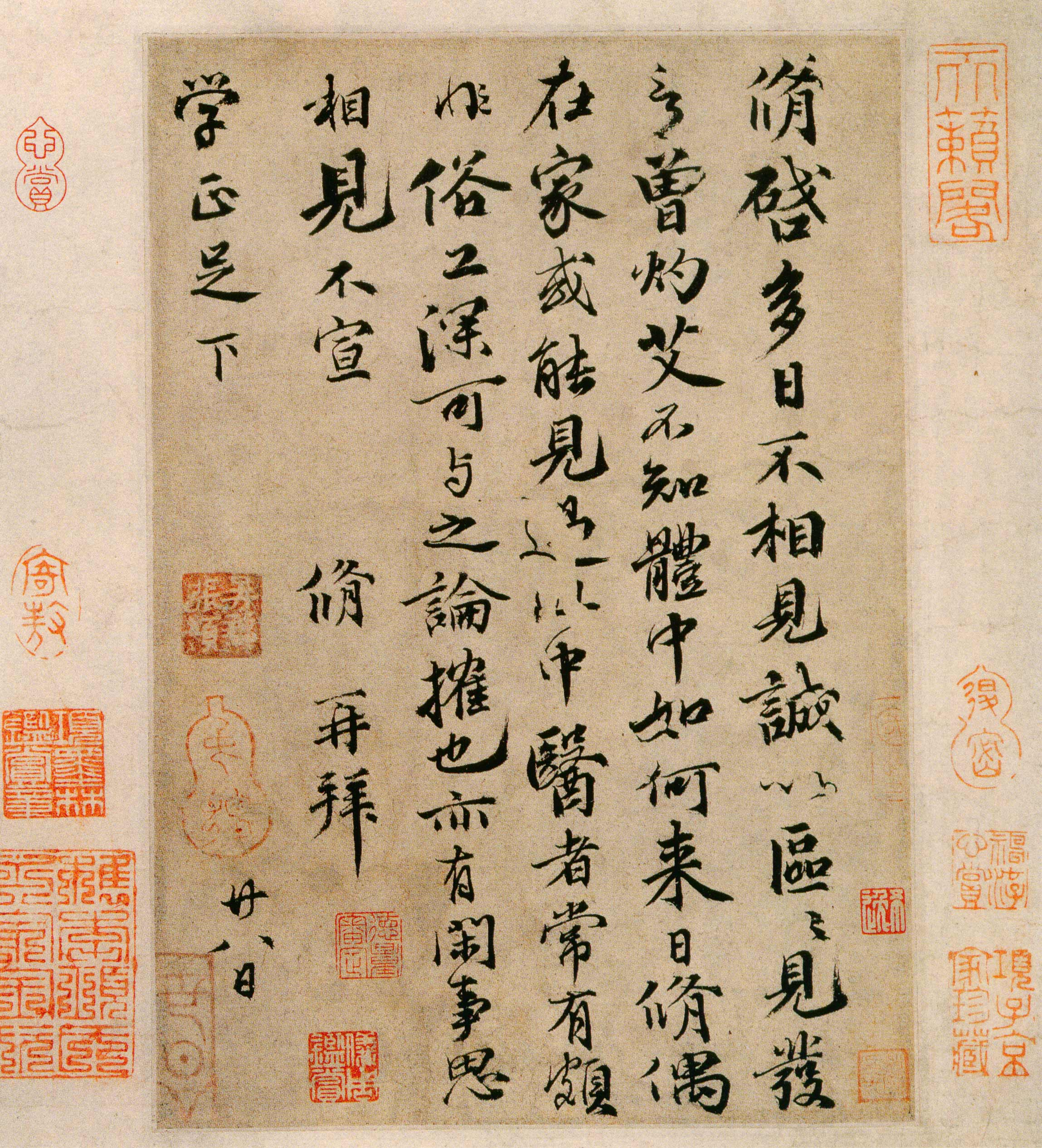 歐陽修書信真跡